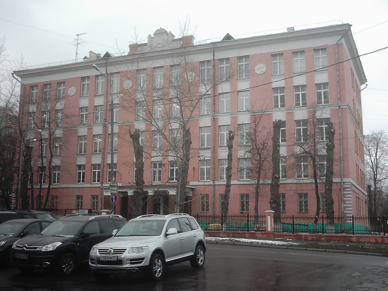 Пересечение с Астрадамским проездом.